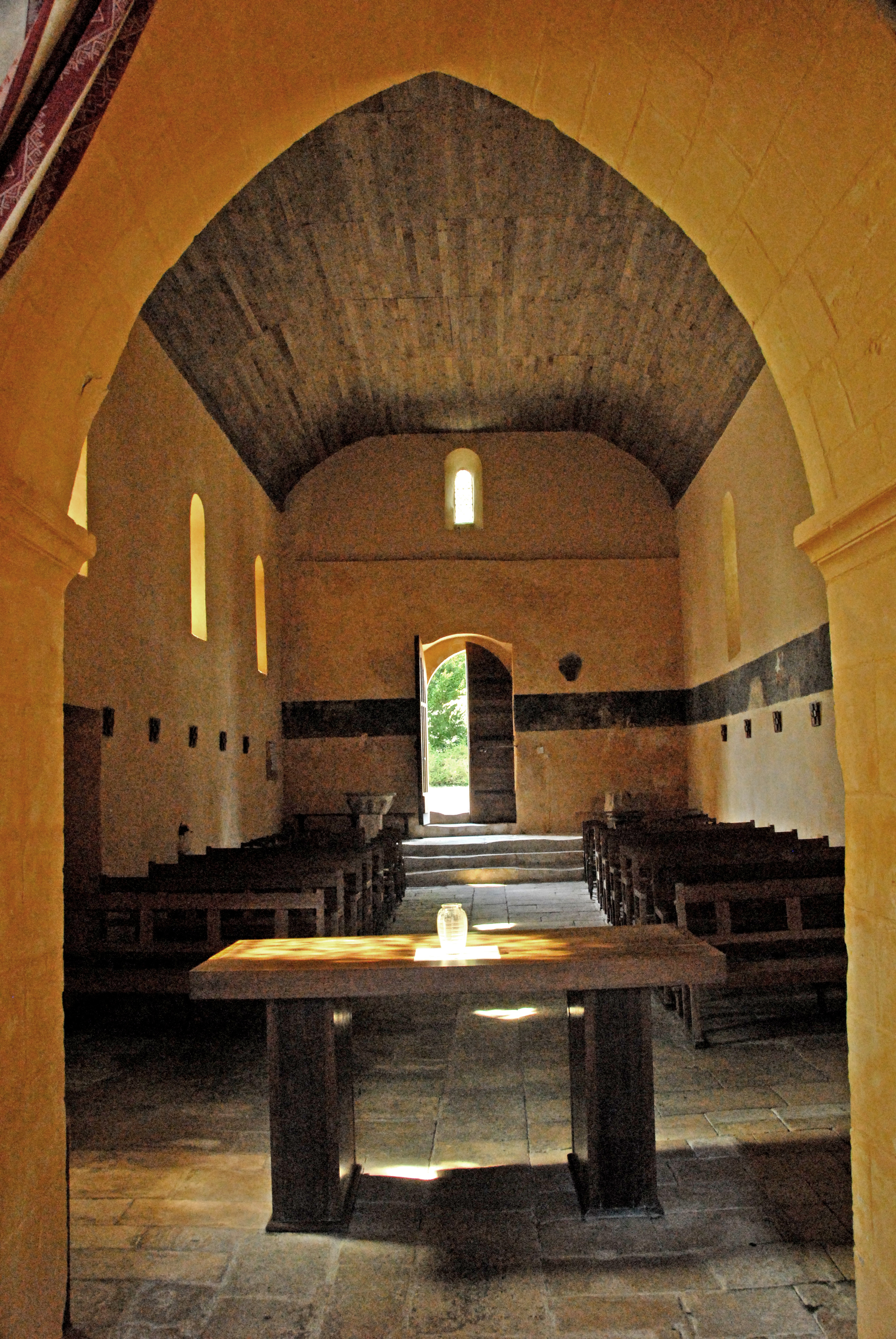 Avy, Dorfkirche,Schiff zum Portal